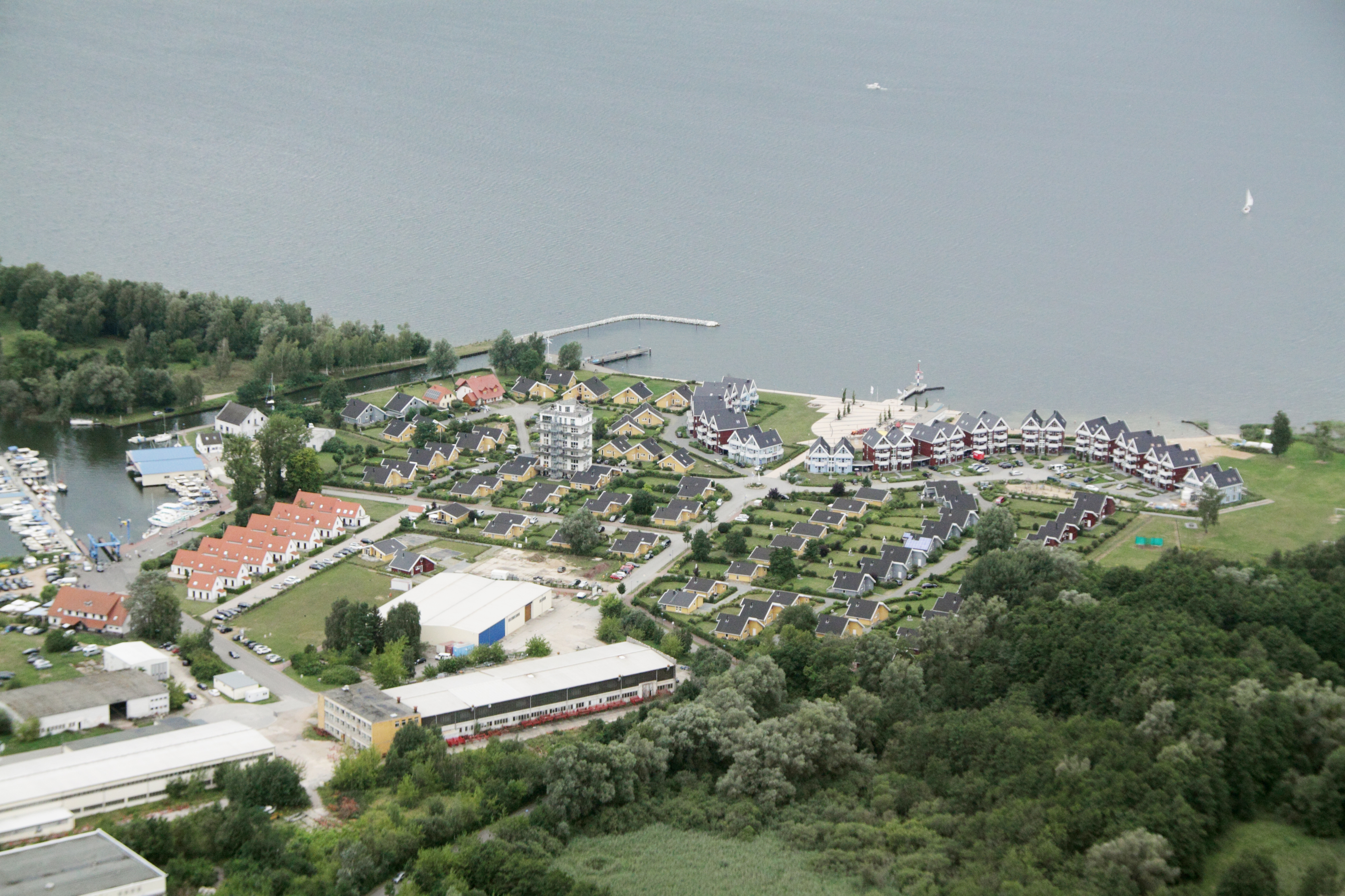 Fotoflug Waren (Müritz) und Umgebung: Hafendorf Rechlin und Müritz